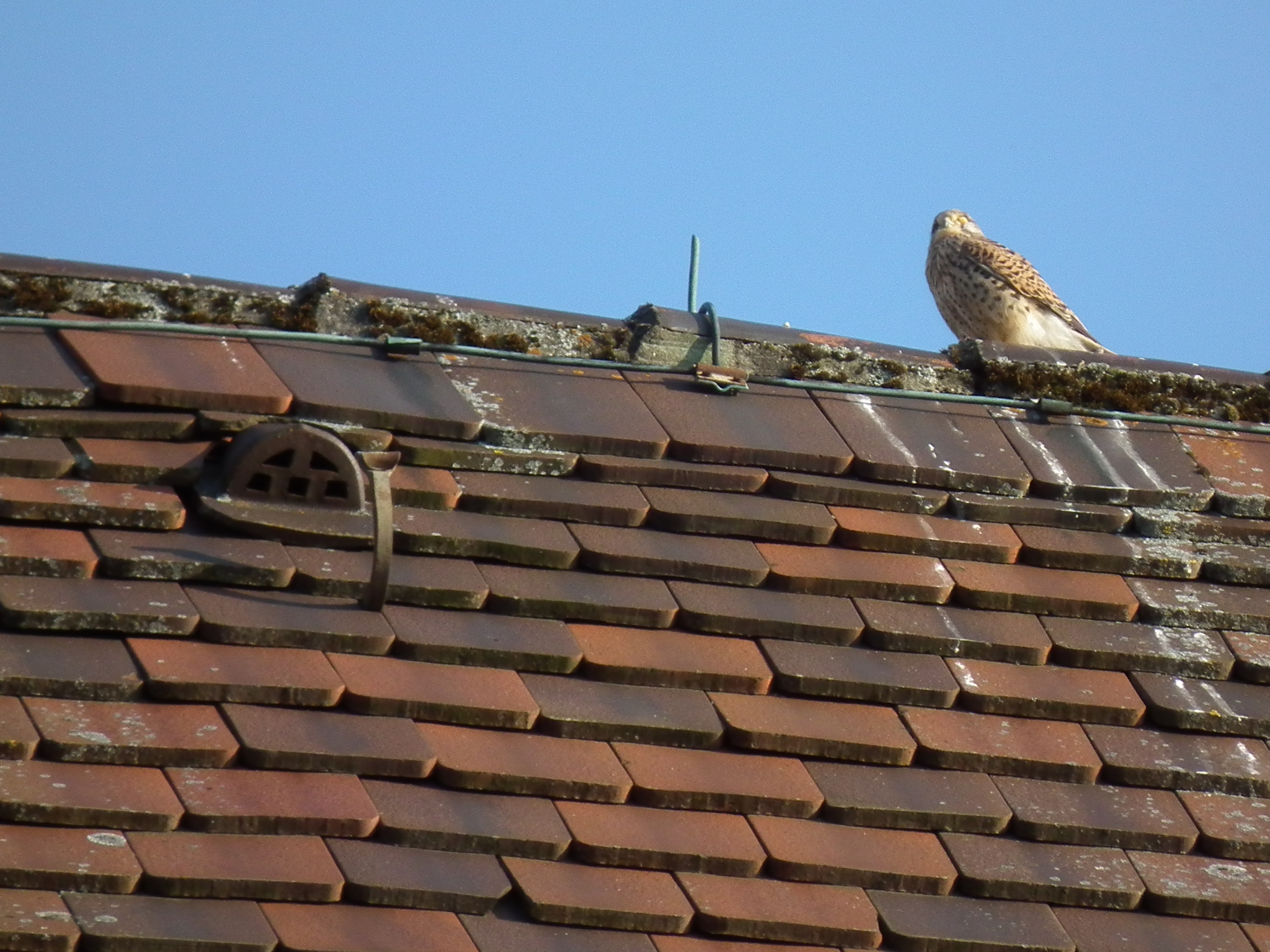 Ziegeldach mit historischem Lüftungsziegel und weiblichem Turmfalken (Falco tinnunculus) auf dem Dachfirst, katholische Kirche St. Peter und Paul in Laupheim (Baden-Württemberg, Deutschland)